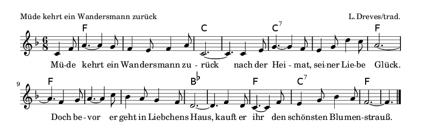 Bänkelsängermelodie Müde kehrt ein Wandersmann zurück